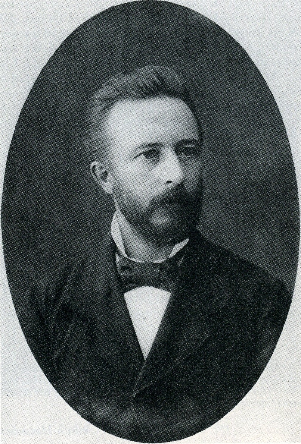 Foto des Archäologen Habbo Gerhard Lolling (1848–1894). Aus dem Album zum 70. Geburtstag Friedrich Wieselers am 19. Oktober 1881.